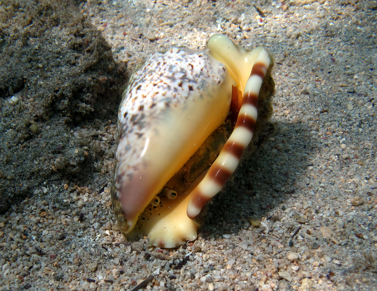 Le gastéropode Strombus lentiginosus à la Réunion.